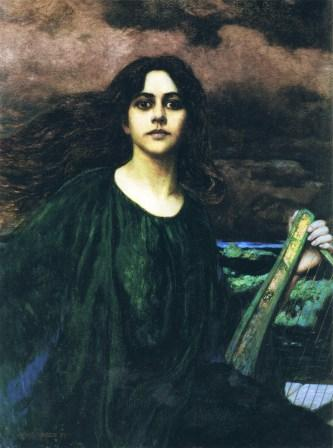 1897 (111,5x84,5 cm)